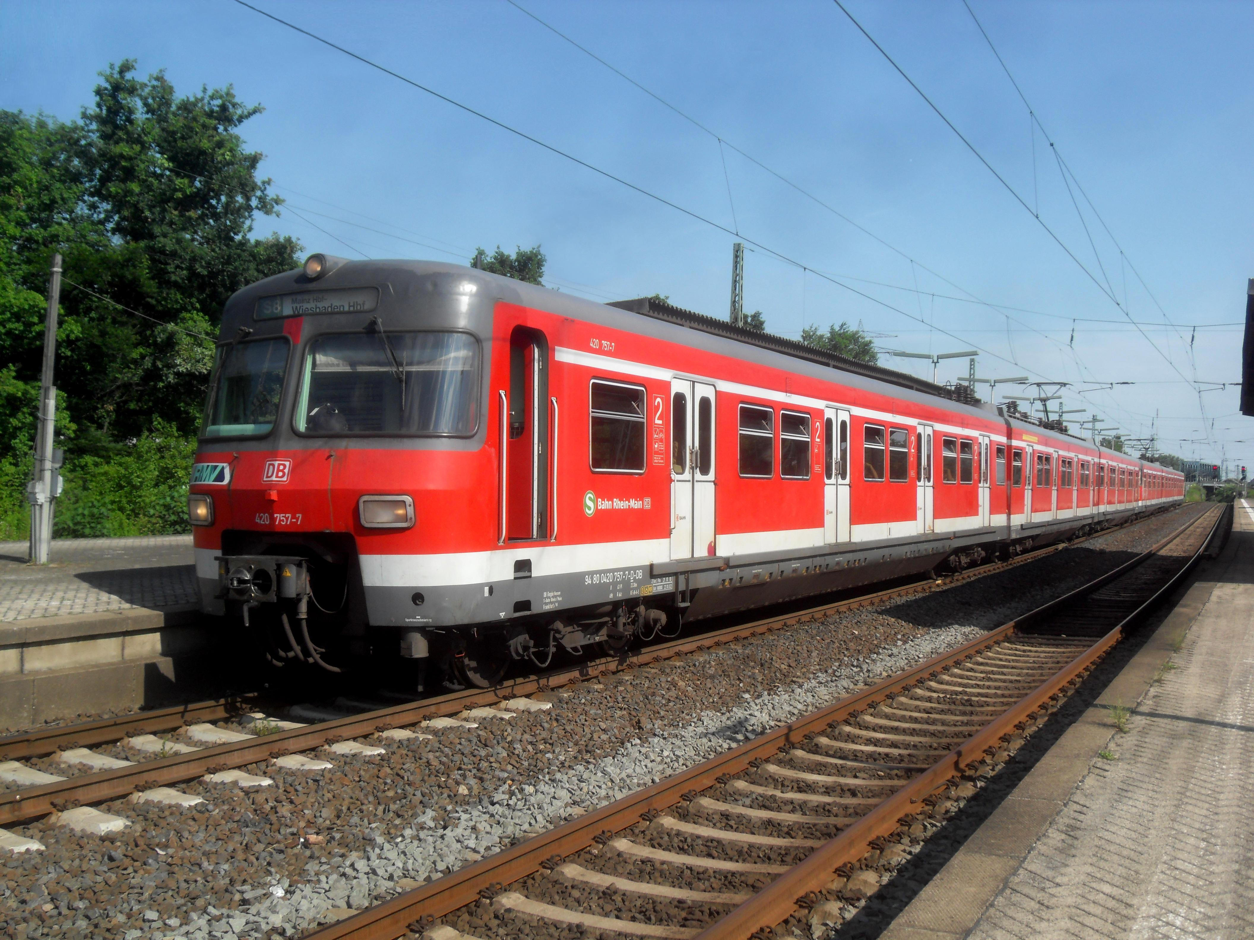 Triebwagen der DB-Baureihe 420 der S-Bahn Rhein-Main auf der Linie S8 im Bahnhof Wiesbaden Ost auf dem Weg nach Wiesbaden Hauptbahnhof in Hessen (Deutschland)